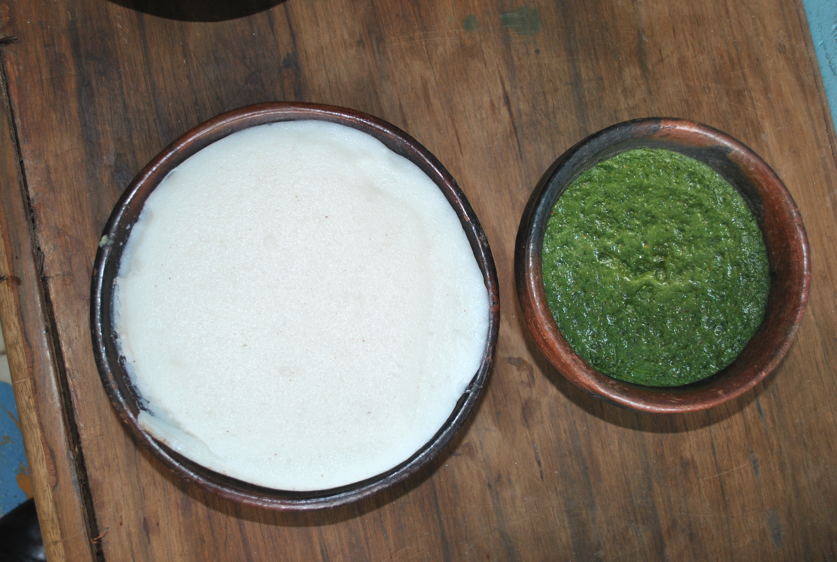 le tô de maïs accompagné de la sauce Tchoron est plat beaucoup consommé par les Senoufos mais le tô blanc est beaucoup plus consommé par ceux de Ferké. on ne peux ,pas parler de gastronomie en pays senoufo sans le tô de maïs et le tchoron This is an image of food from Côte d'Ivoire